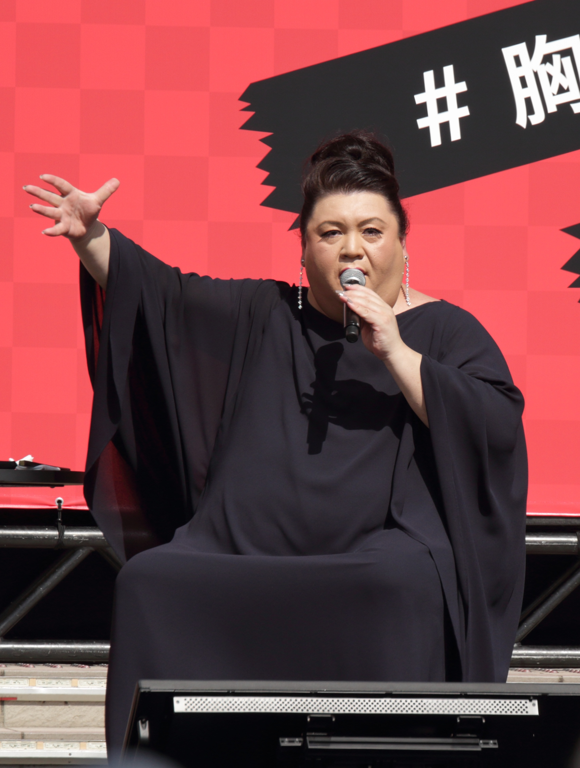 マツコ・デラックス（東京モーターフェス2018）